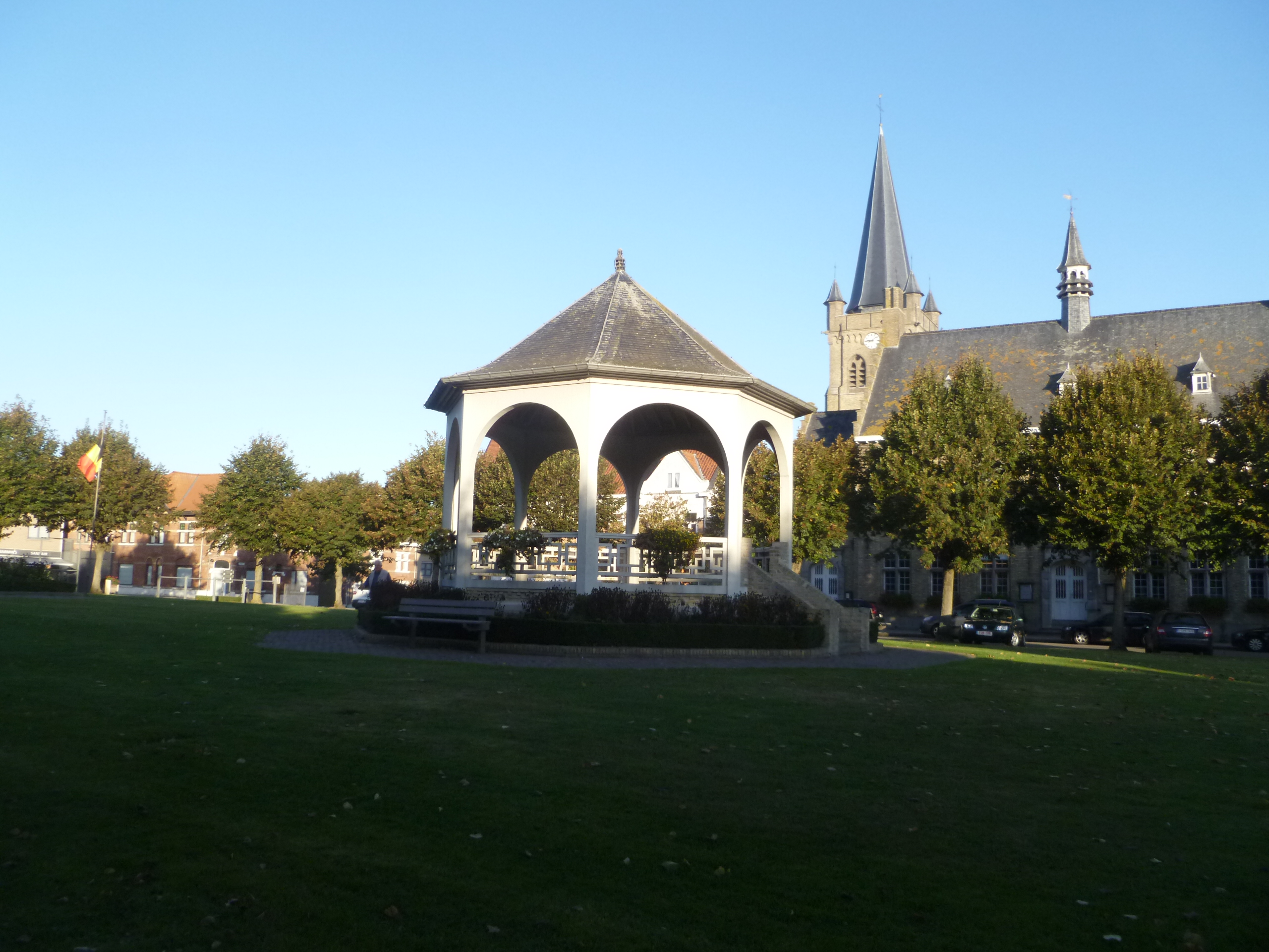 Marktplaats van Wijtschate, België